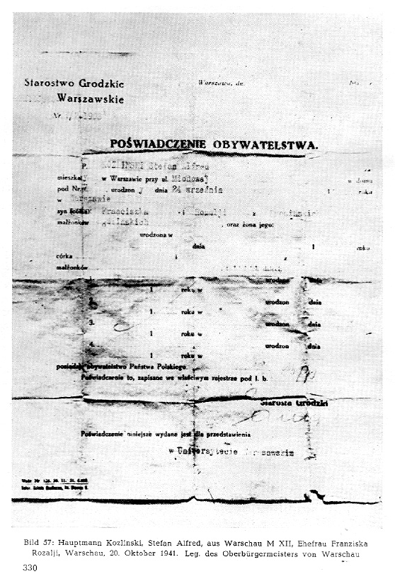 Фотография документа, найденного немцами в 1943 году в Катынской могиле. Название: Фото 57: Капитан Козлинский, Стефан Альфред из Варшавы, M. XII, жена Франциска Розали, Варшава, 20 октября 1941 г. Засвидетельствовано обербургомистром ВАРШАВЫ.